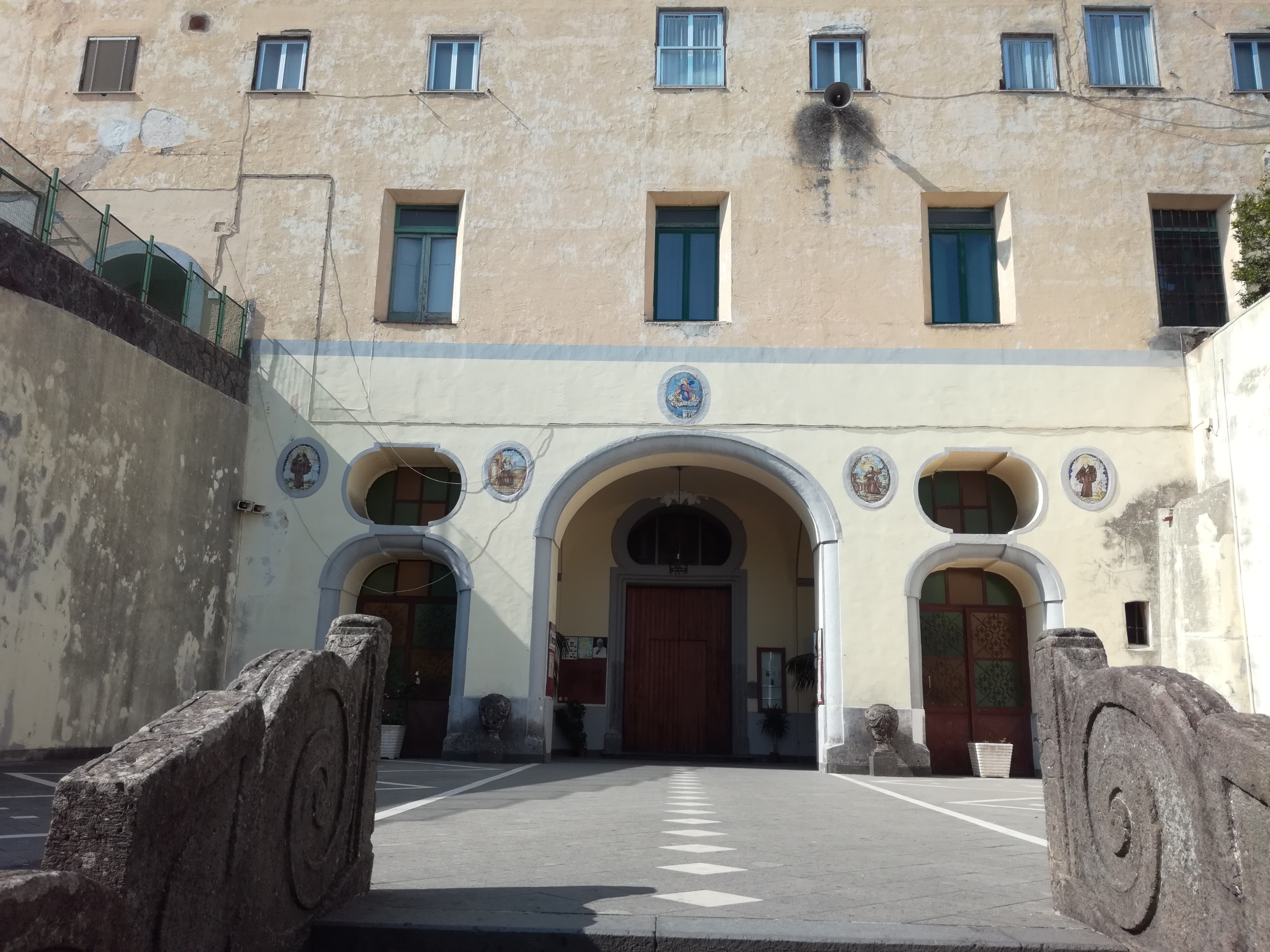 Cortile Eframo Vecchio